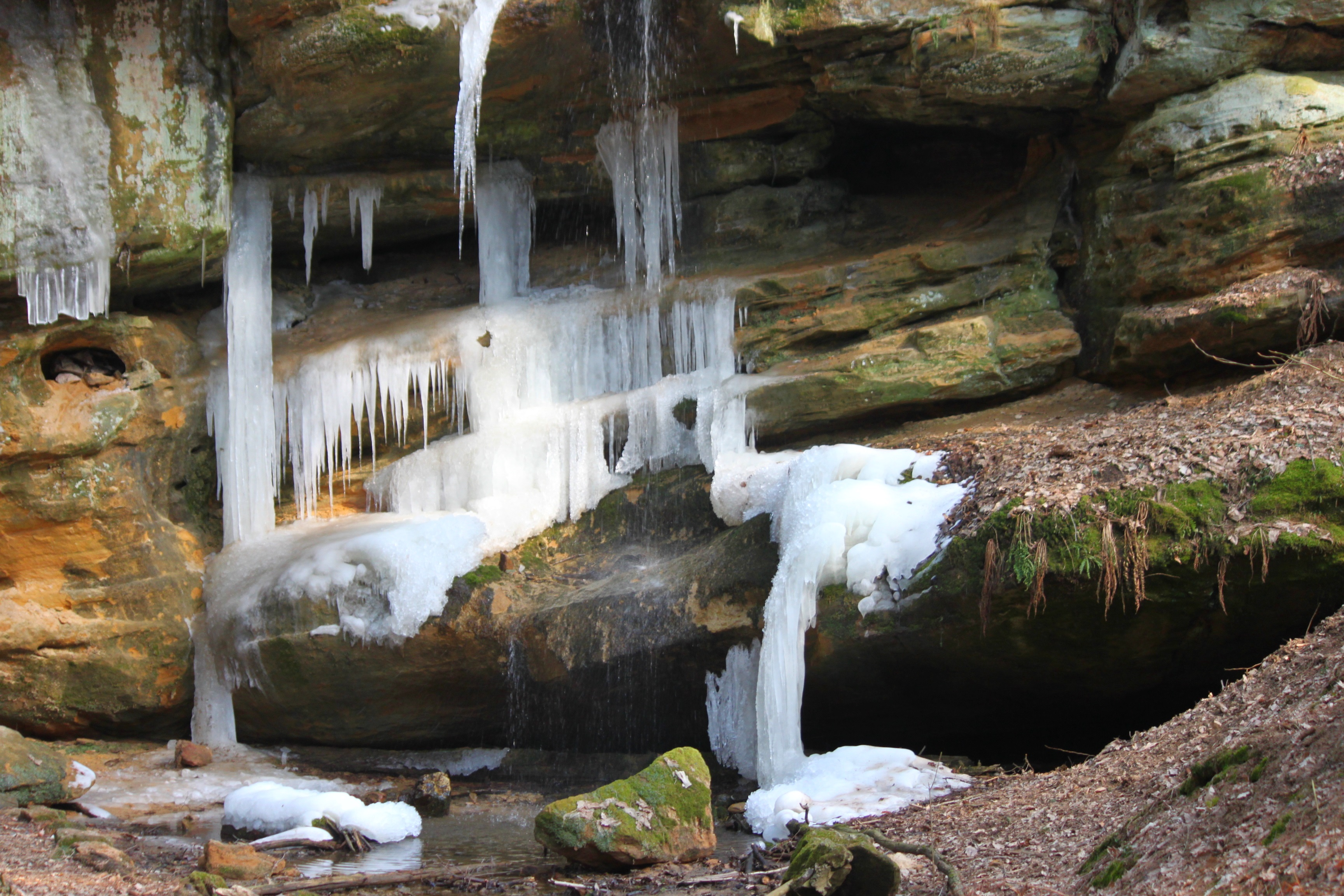 Wasserfall im Vatsbrunn-Graben bei Veitlahm, Gemeinde Mainleus